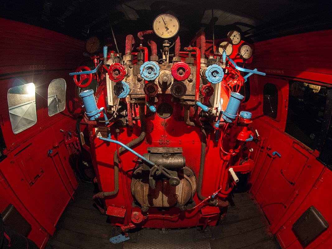 29.05.2015, 433.002, Valašské Meziříčí